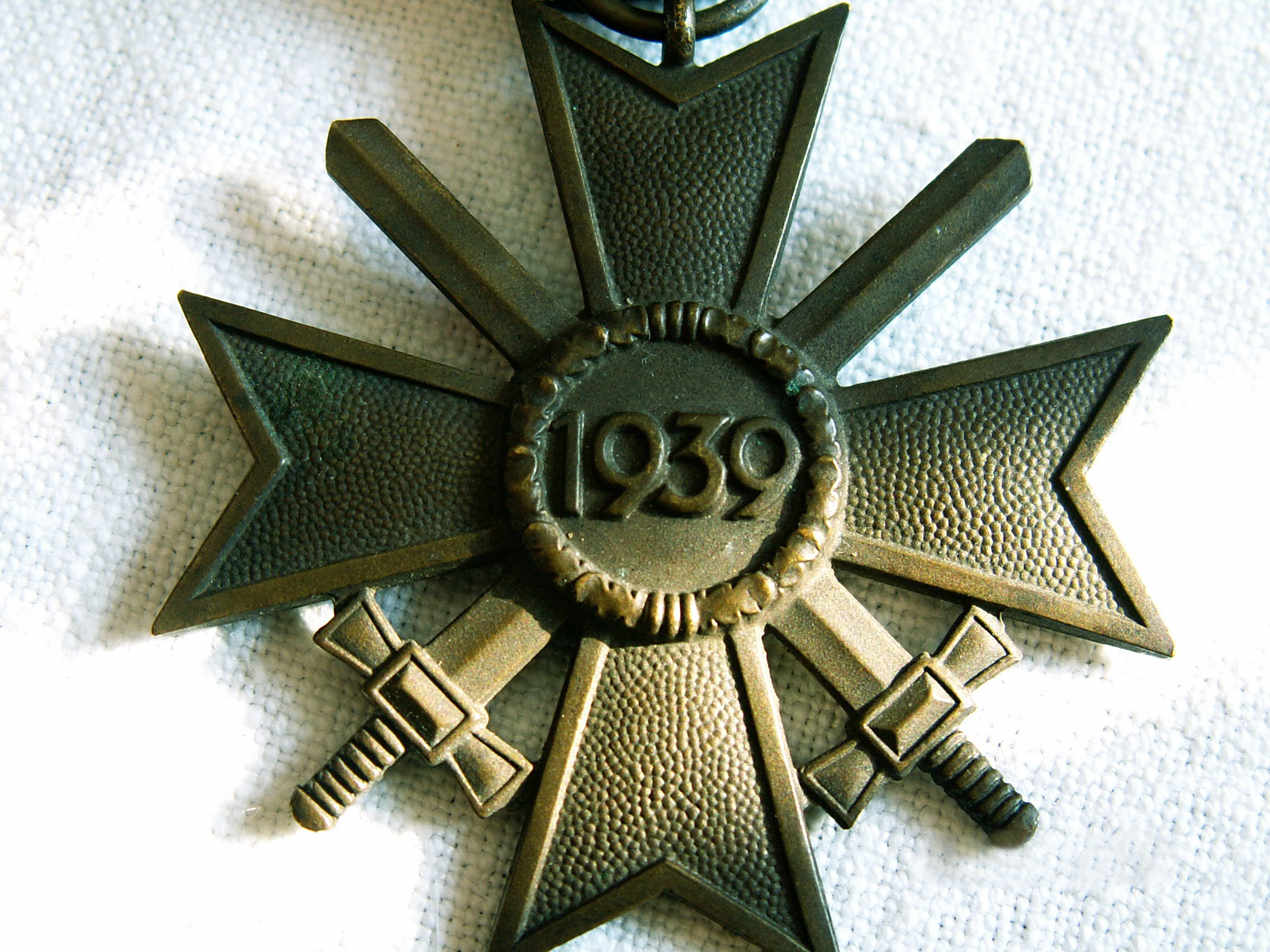 Nazi War Merit Cross with swords, Kriegsverdienstkreuz mit Schwertern